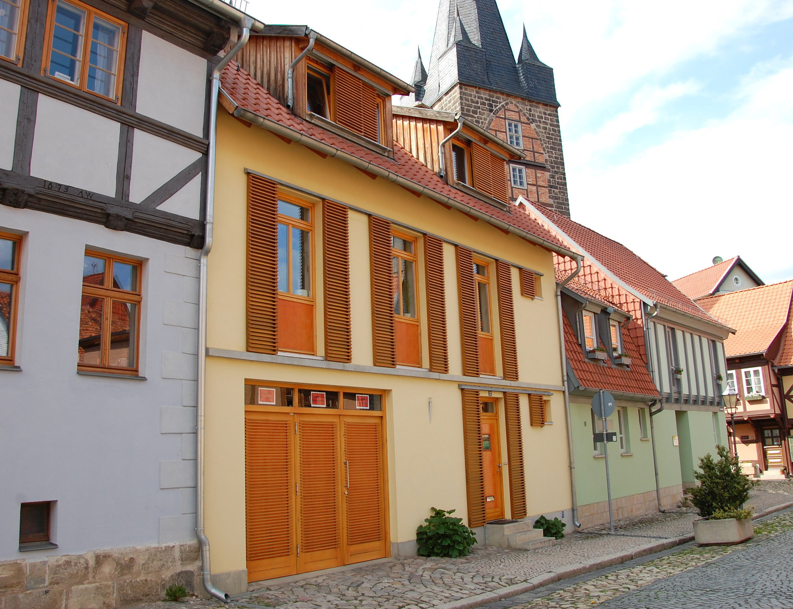 Haus Neuendorf 23, 24 in Quedlinburg